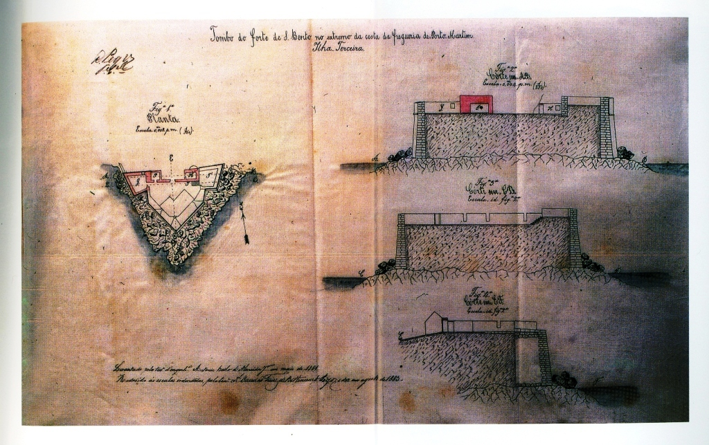 Tombo do forte de S. Bento no extremo da costa da freguesia de Porto Martim", Ilha Terceira (Açores), Portugal.